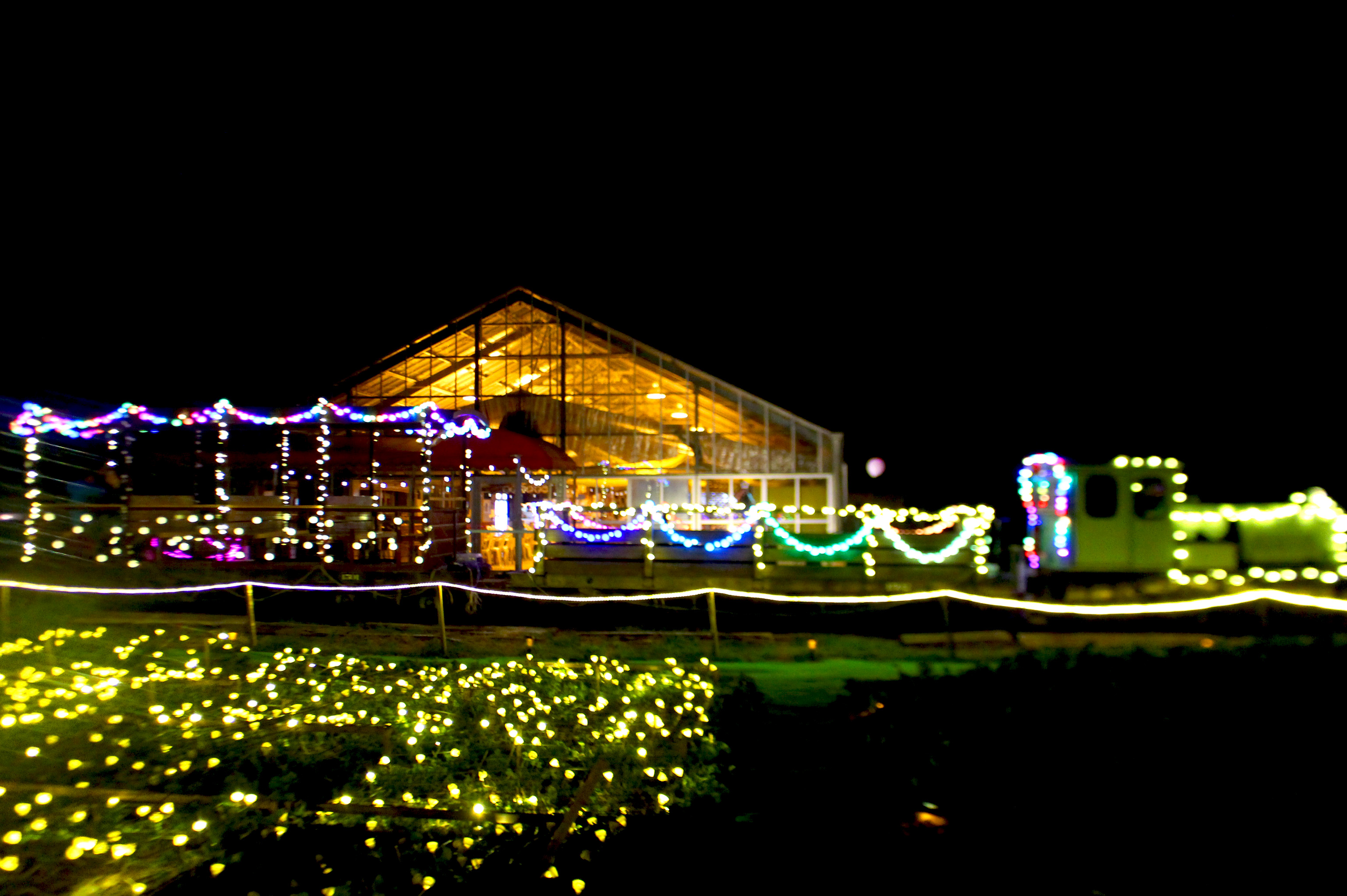 成田ゆめ牧場イルミネーション（2019年1月）